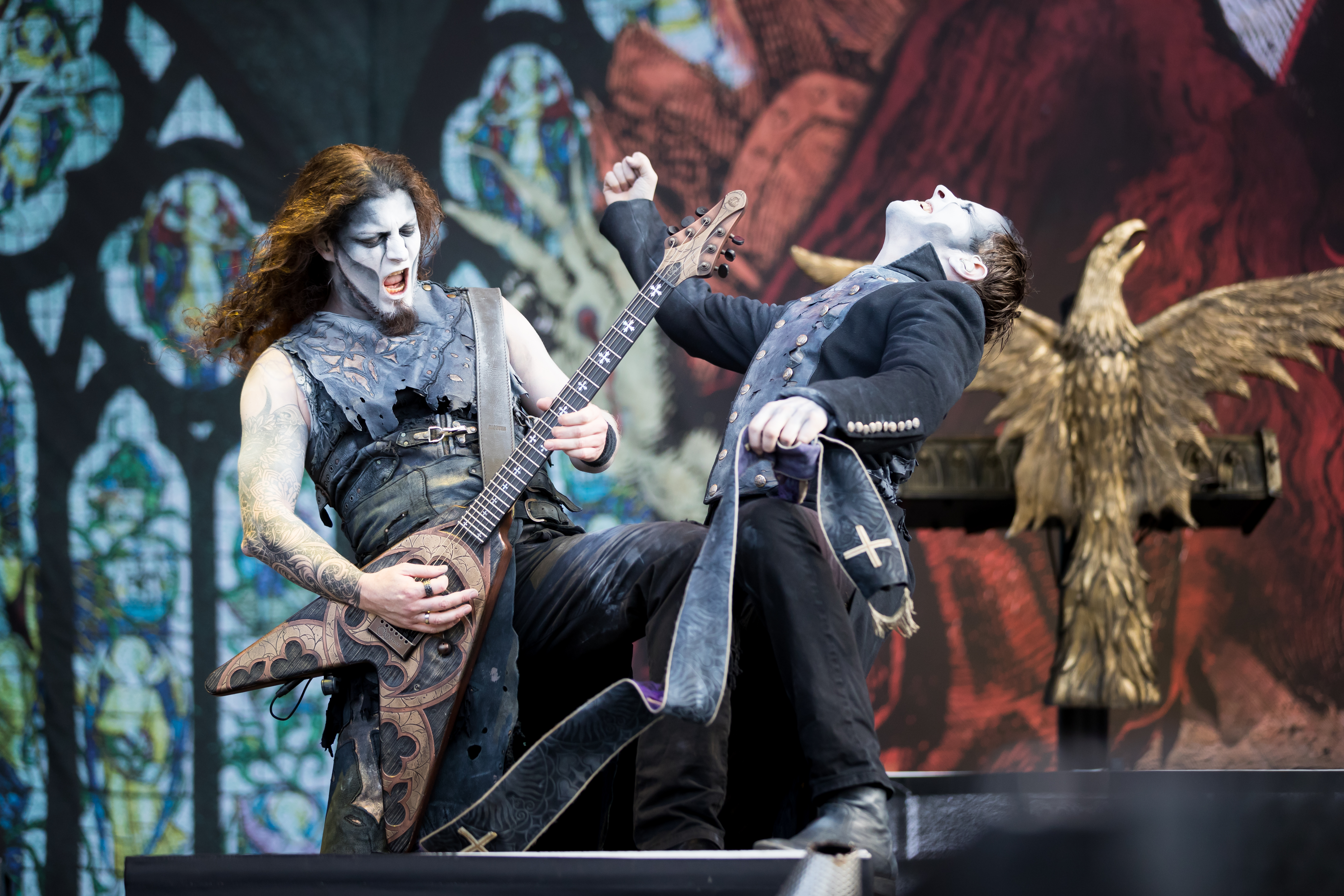 Powerwolf during Wacken Open Air at Schleswig-Holstein, Wacken, , Germany on 2017-08-05, Photo: Sven Mandel